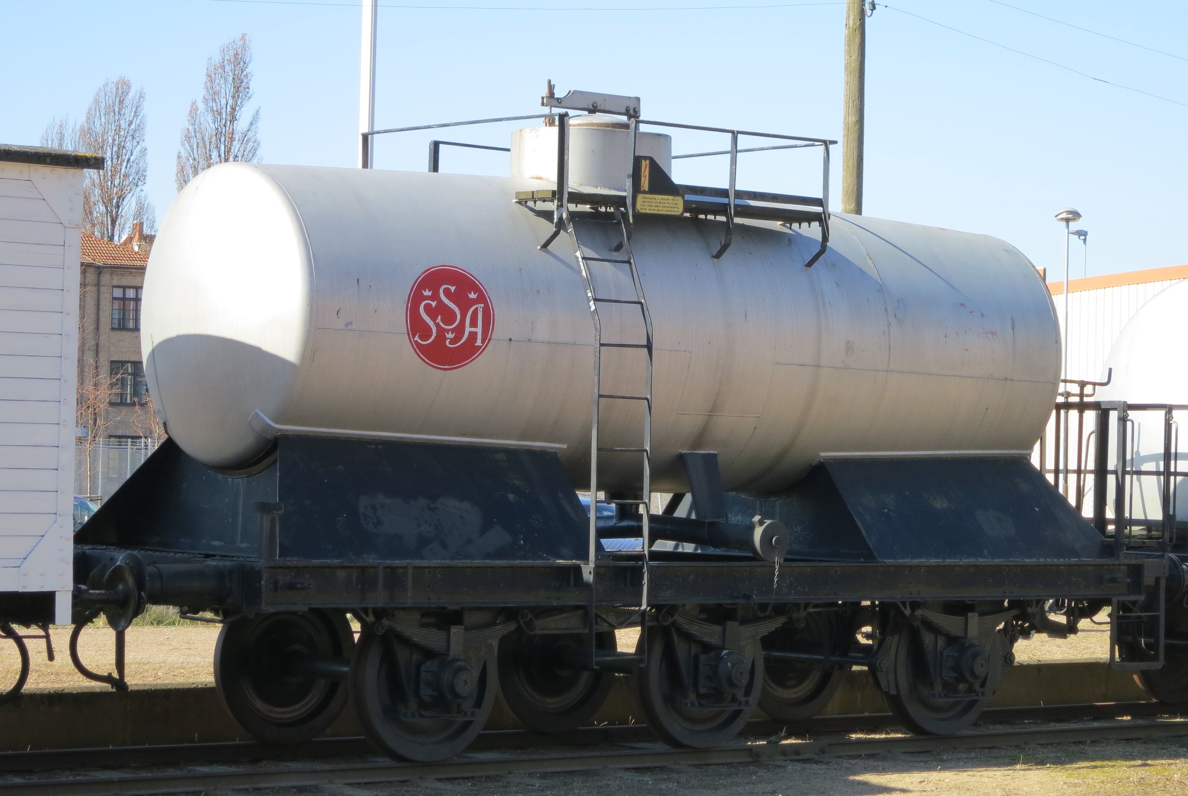 Tankvagn SSA på Kristianstads järnvägsmuseum